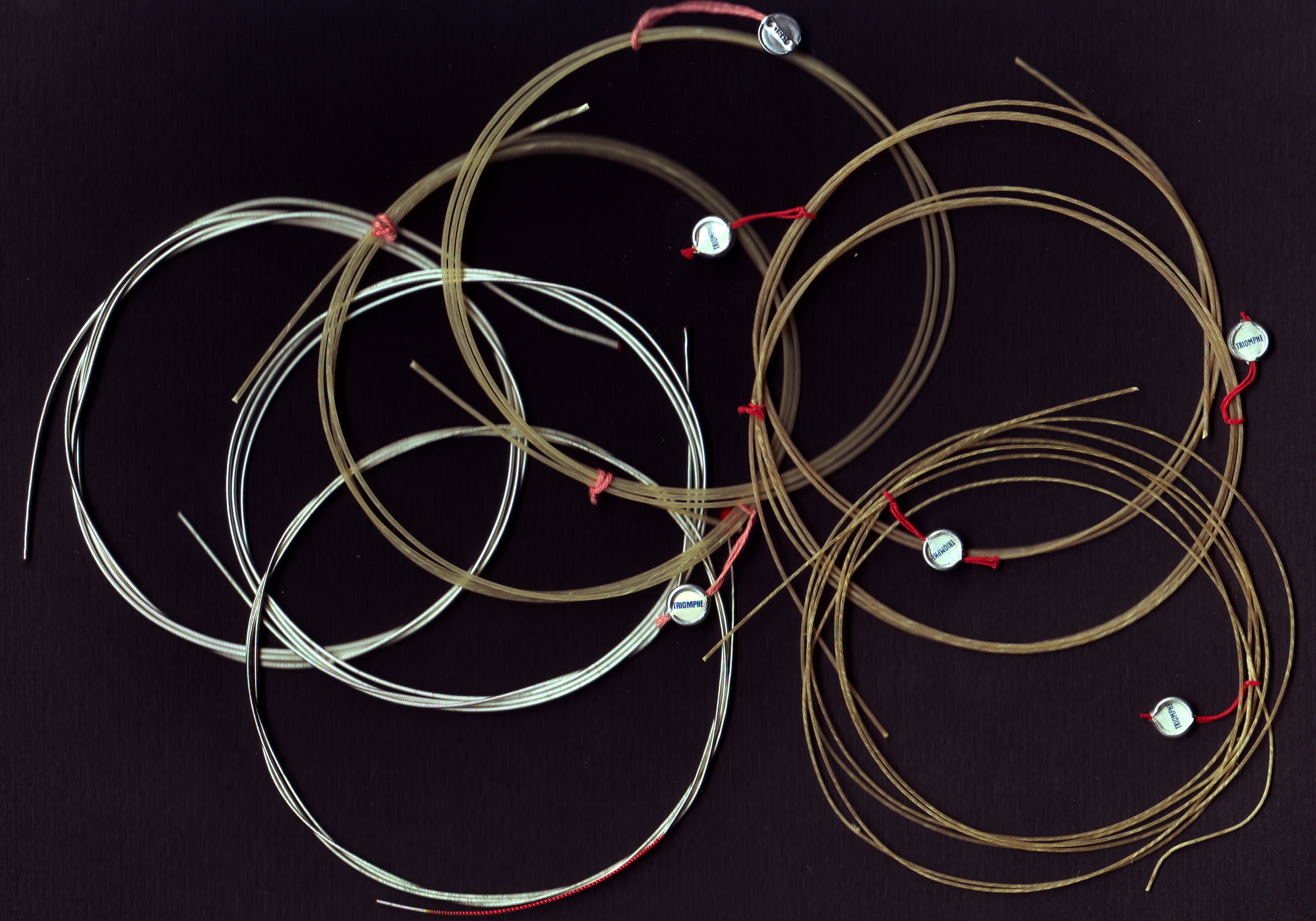 Cordes de guitare Triomphe en boyau fabriquées jusque dans les années 1960 par Babolat-Maillot-Witt Lyon France - Catgut guitar strings made before 1970 by Babolat-Maillot-Witt Lyon France